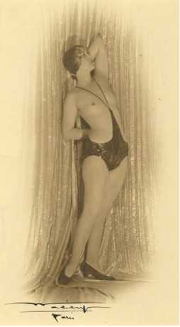 Folies Bergere Performer - Guna Mori in "monokini"